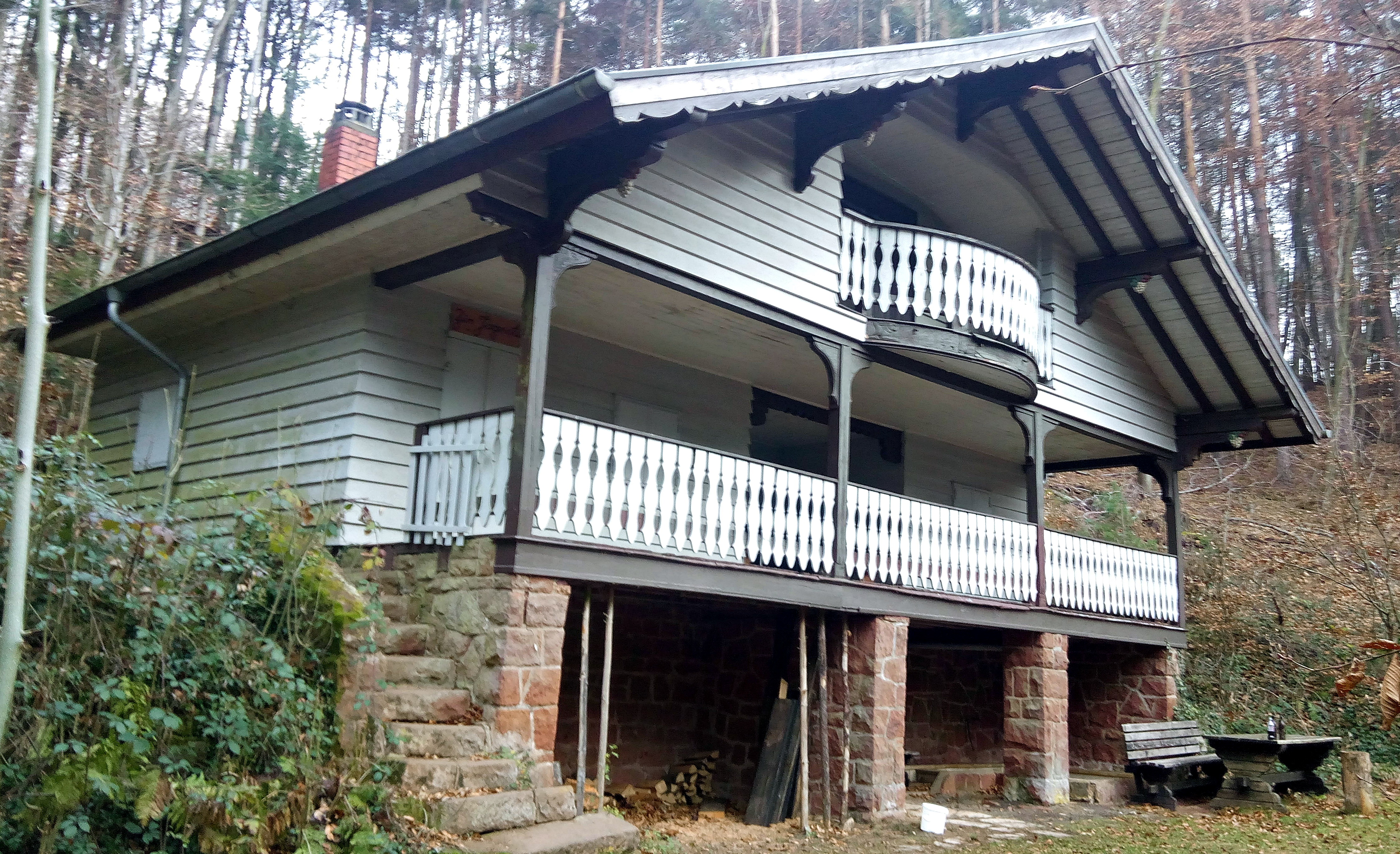 Jagdhaus Lassmichinruh des Gauleiters Josef Bürckel, Ramsen